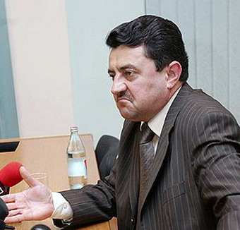 Ołeksij Hryhorowicz Iwczenko, ukr. Олексій Григорович Івченко (ur. 2 stycznia 1963 w miejscowości Chorobriw w rejonie sokalskim) – ukraiński polityk.